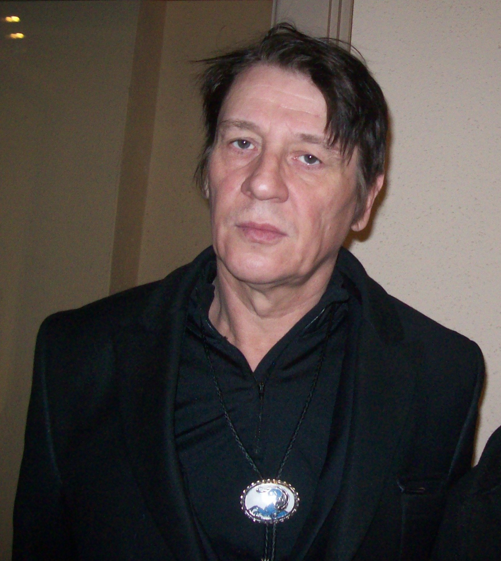 Maciej Maleńczuk